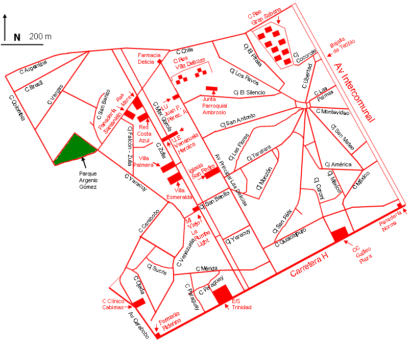 Mapa del sector Delicias Nuevas, Parroquia Ambrosio, Municipio Cabimas, Zulia, Venezuela